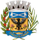 Brasão_do_Município_de_Paulistânia